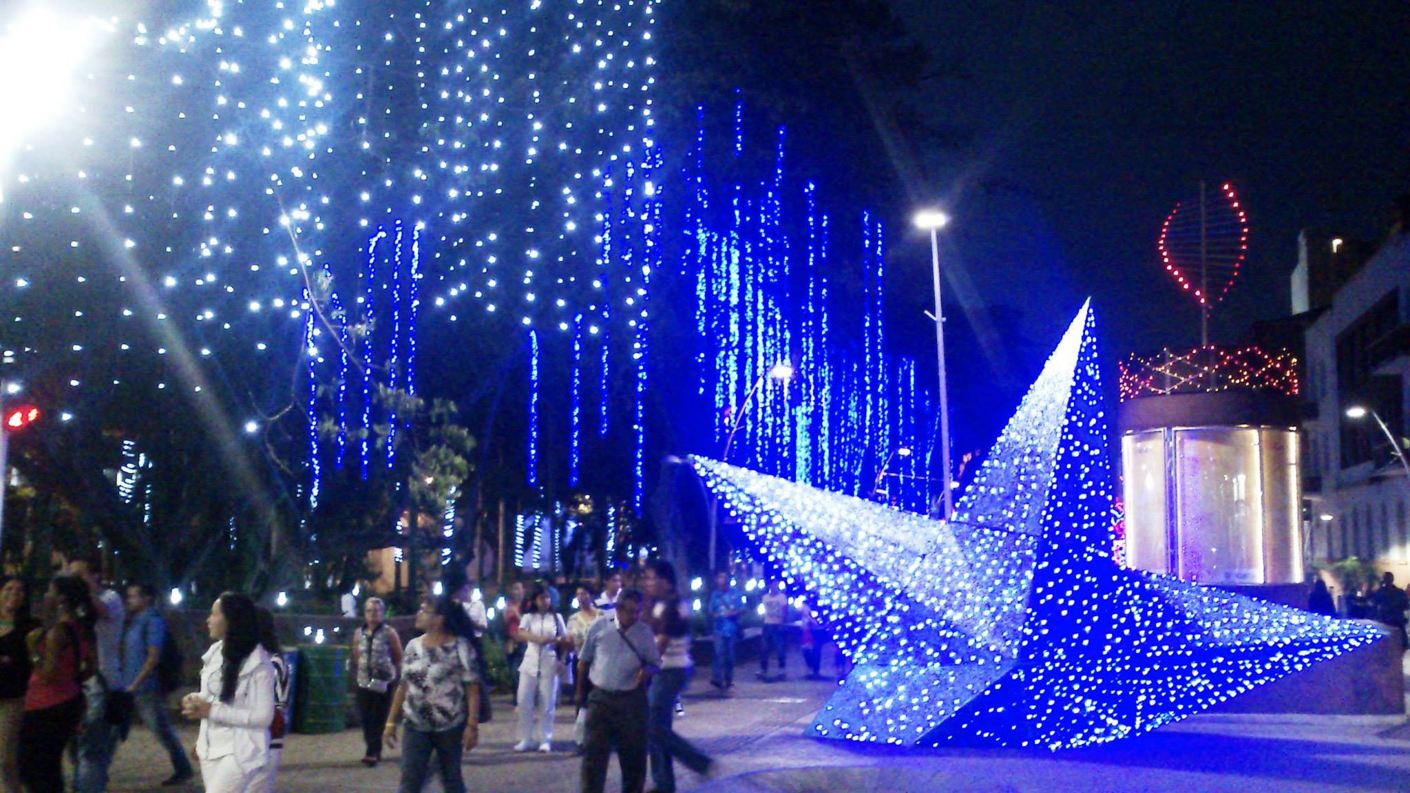 Alumbrado navideño en Cali 2013